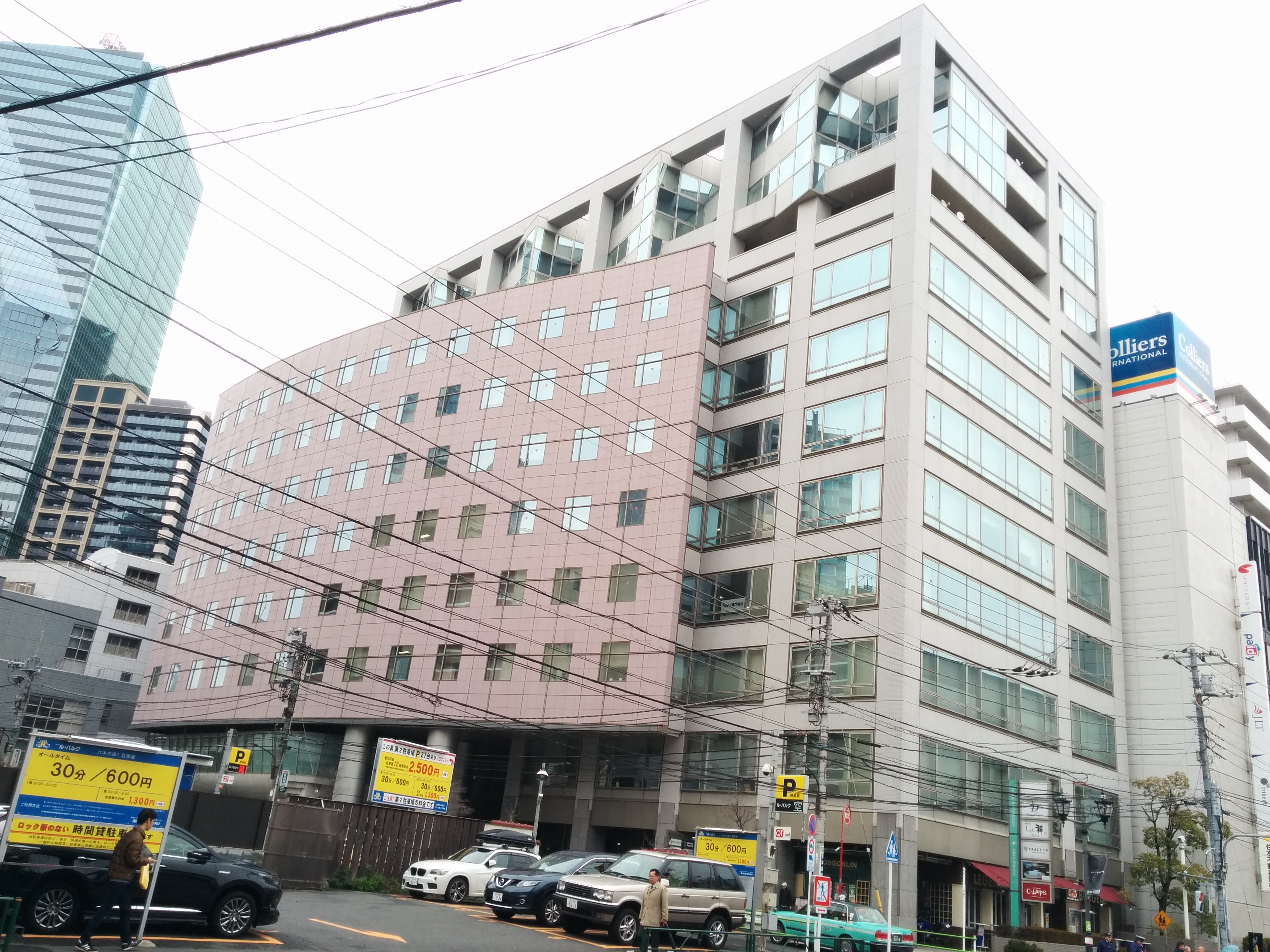 日本台湾交流協会東京本部 青葉六本木ビル